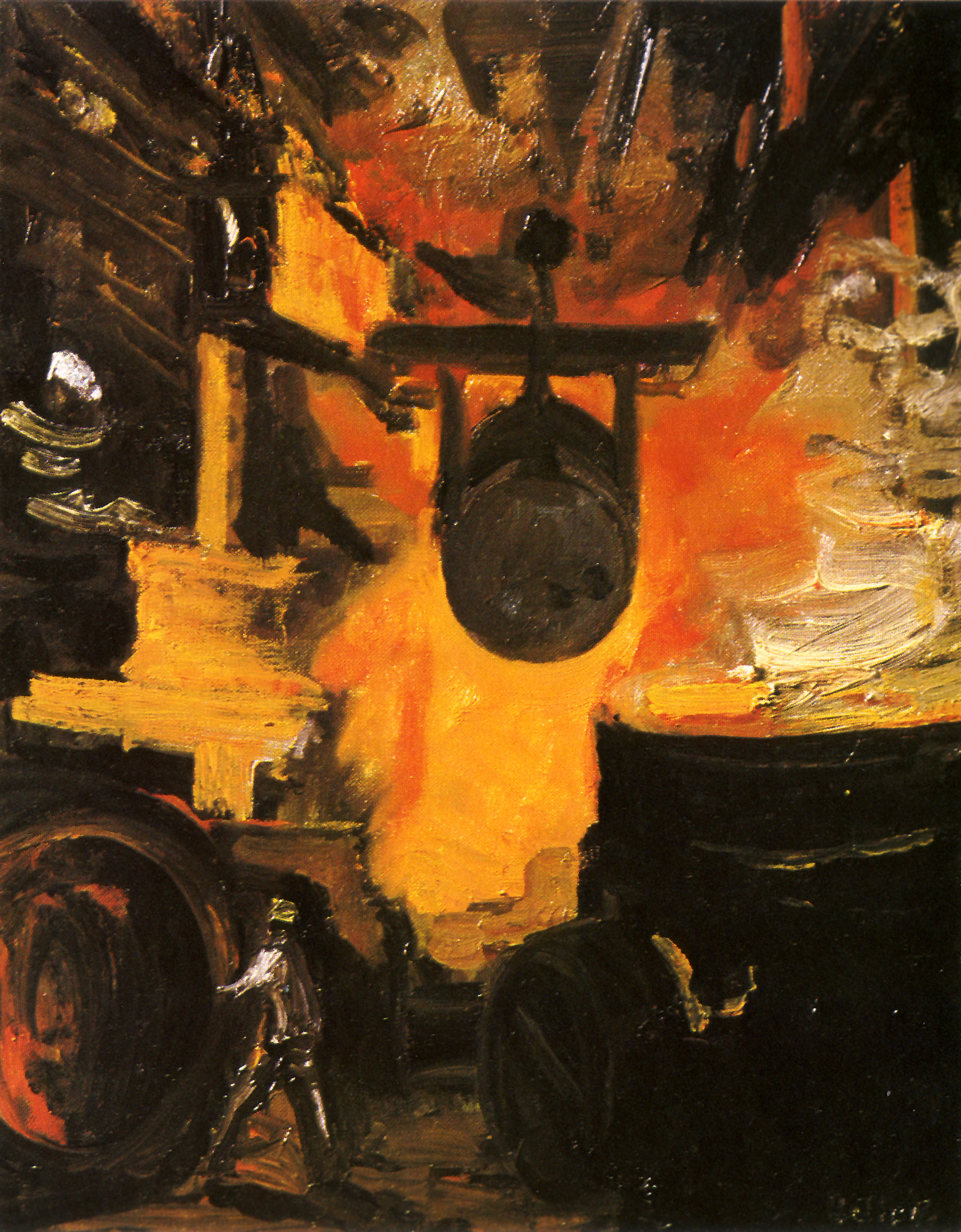 Hochofenanstich bei der VÖESTtitle QS:P1476,de:"Hochofenanstich bei der VÖEST" label QS:Lde,"Hochofenanstich bei der VÖEST"